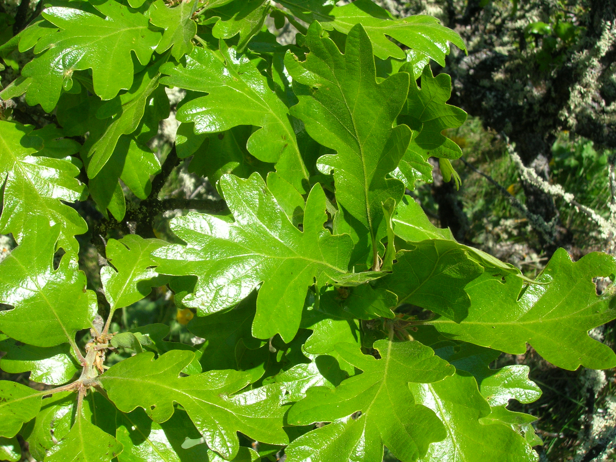 Quercus garryana (Garry Oak; Fagaceae), Rowena, Oregon.